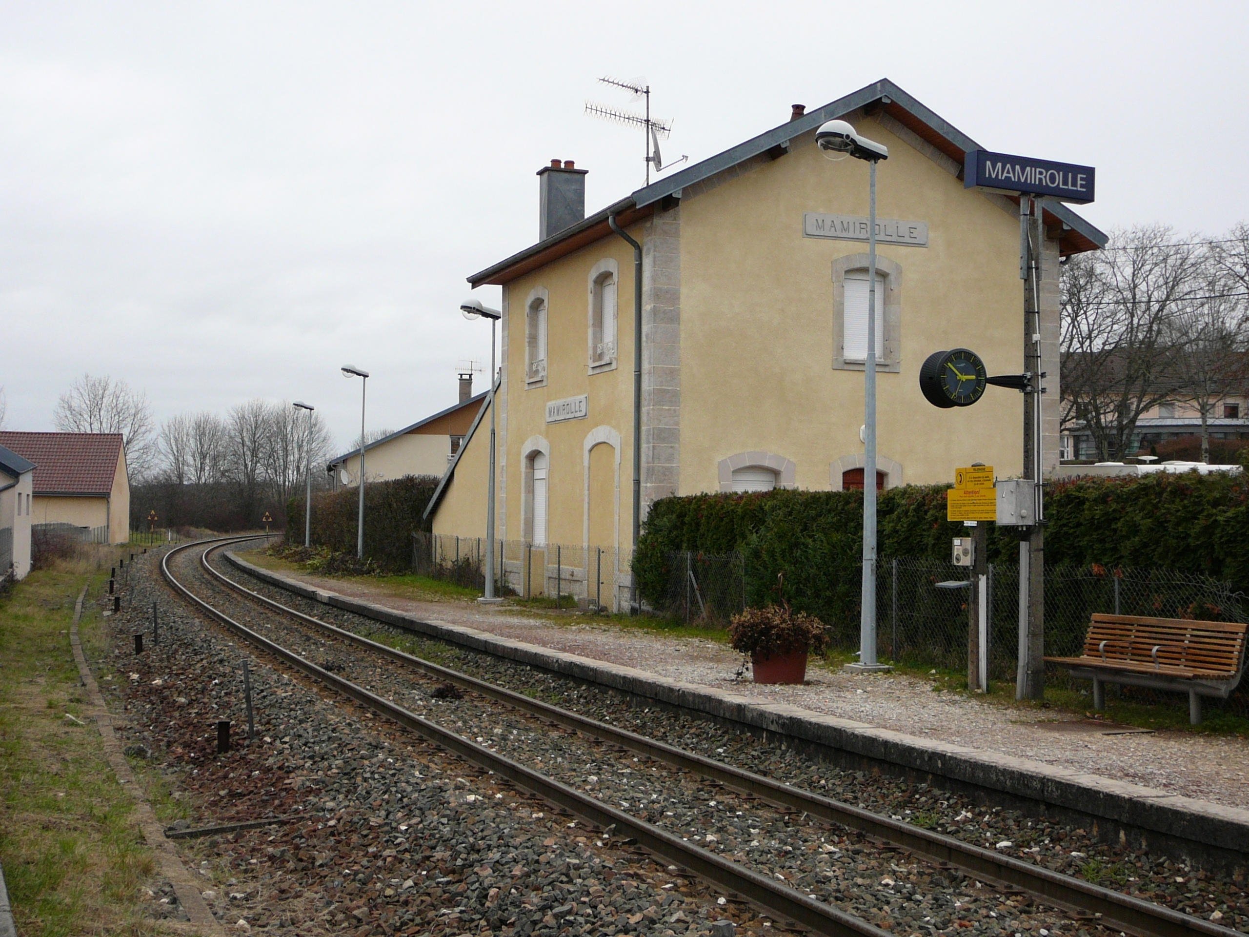 Halte de Mamirolle, vue en direction de Morteau